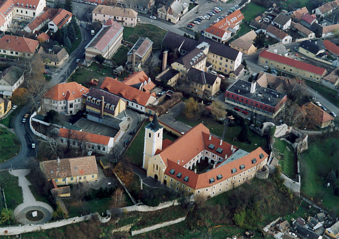 Agoston Convent - Siklós - Hungary - Europe